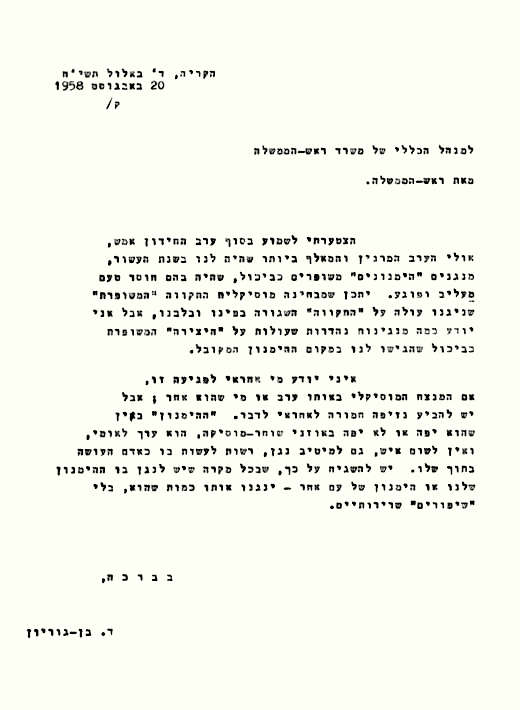 אף על פי שנקבע לחן קבוע להמנון, במהלך חידון התנ"ך בשנת 1958, נוגנה "התקווה" בלחן שונה. ראש הממשלה דוד בן-גוריון, אשר נכח בטקס, ביקש ביום המחרת ממנכ"ל משרדו להעביר נזיפה בנושא לאחראים על כך. בדבריו ציין בן-גוריון כי ההמנון "הוא ערך לאומי, ואין לשום איש ... רשות לעשות בו כאדם העושה בתוך שלו. יש להשגיח על כך שבכל מקרה שיש לנגן בו המנון שלנו..., ינגנו אותו כמות שהוא, בלי 'שיפורים' שרירותיים".